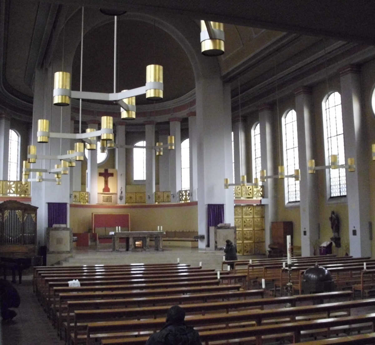 Der Innenraum des Kleinen Michel in Hamburg (2012)